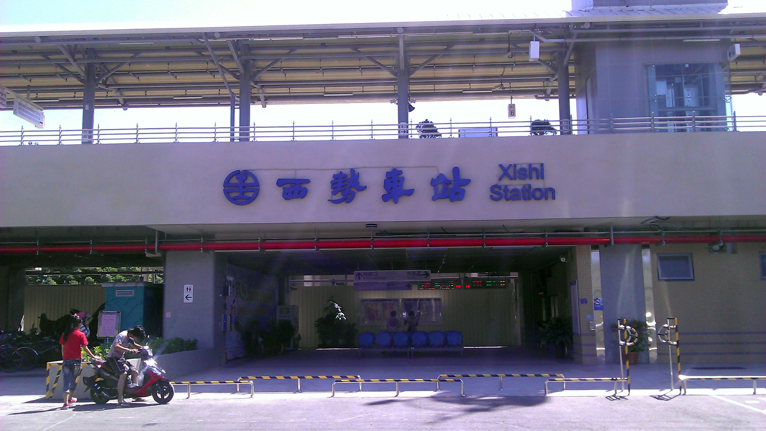 於公元二〇一三年六月二十五日（2013-6-25）啟用，並配合鐵路高架化的西勢車站新址。